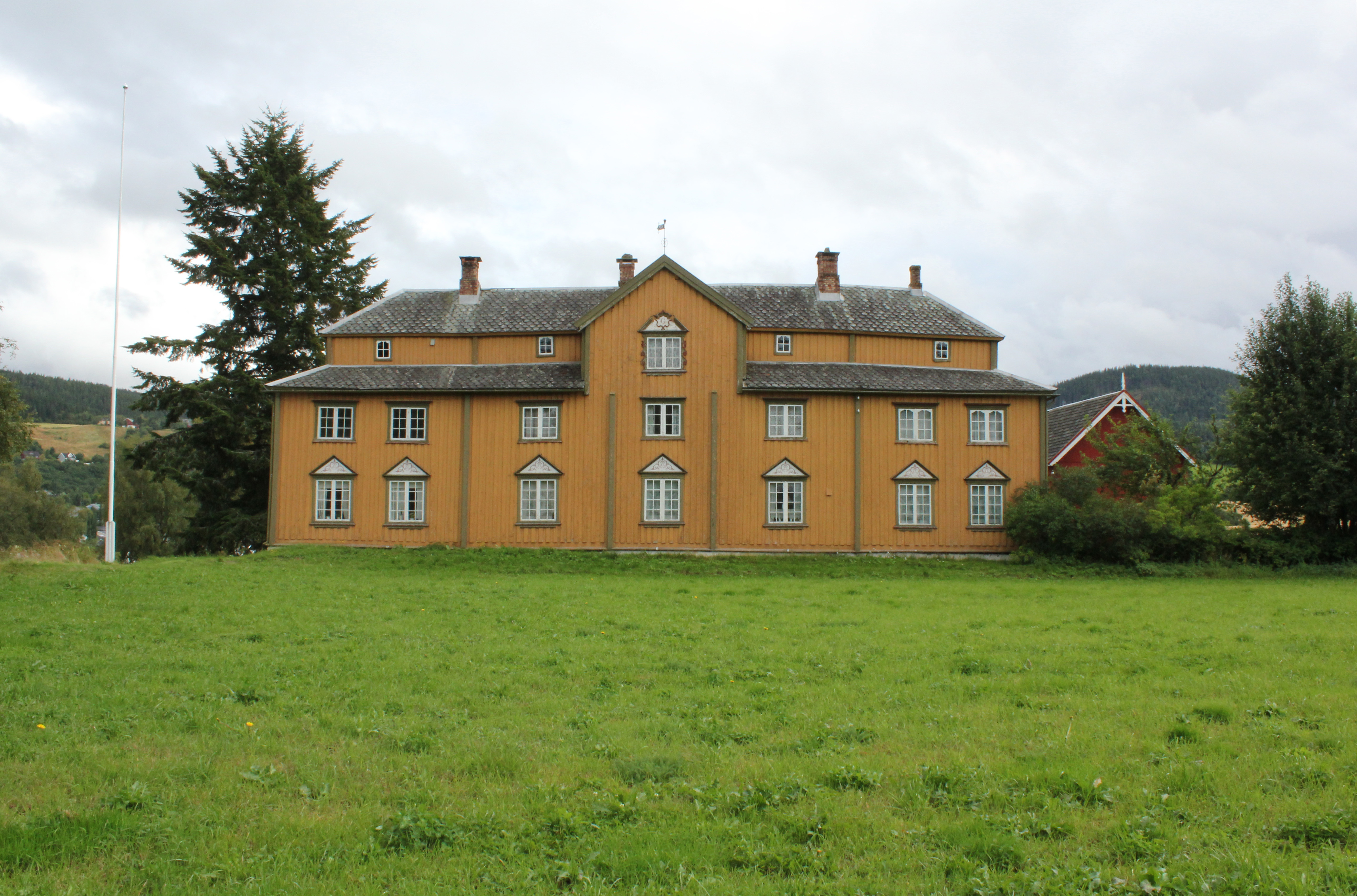 Gjesvold/Gjesvål gård, Orkdal. Hovedbygningen (1773) sett fra kirkegården ved Orkdal kirke, som ligger ca 150 m NV for gården